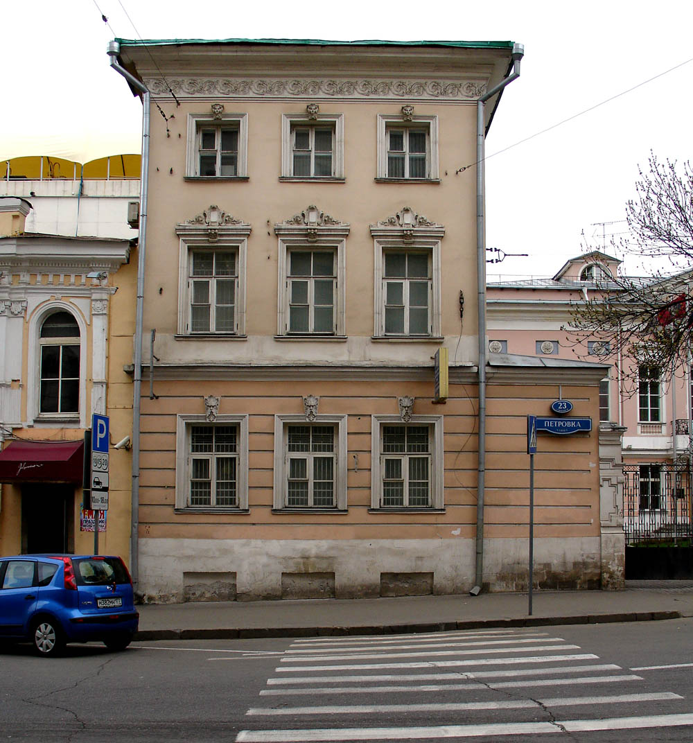 Petrovka Street, Moscow